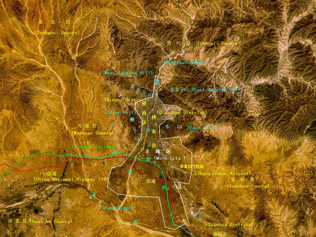 张家口市主城区及附近的卫星图片。.